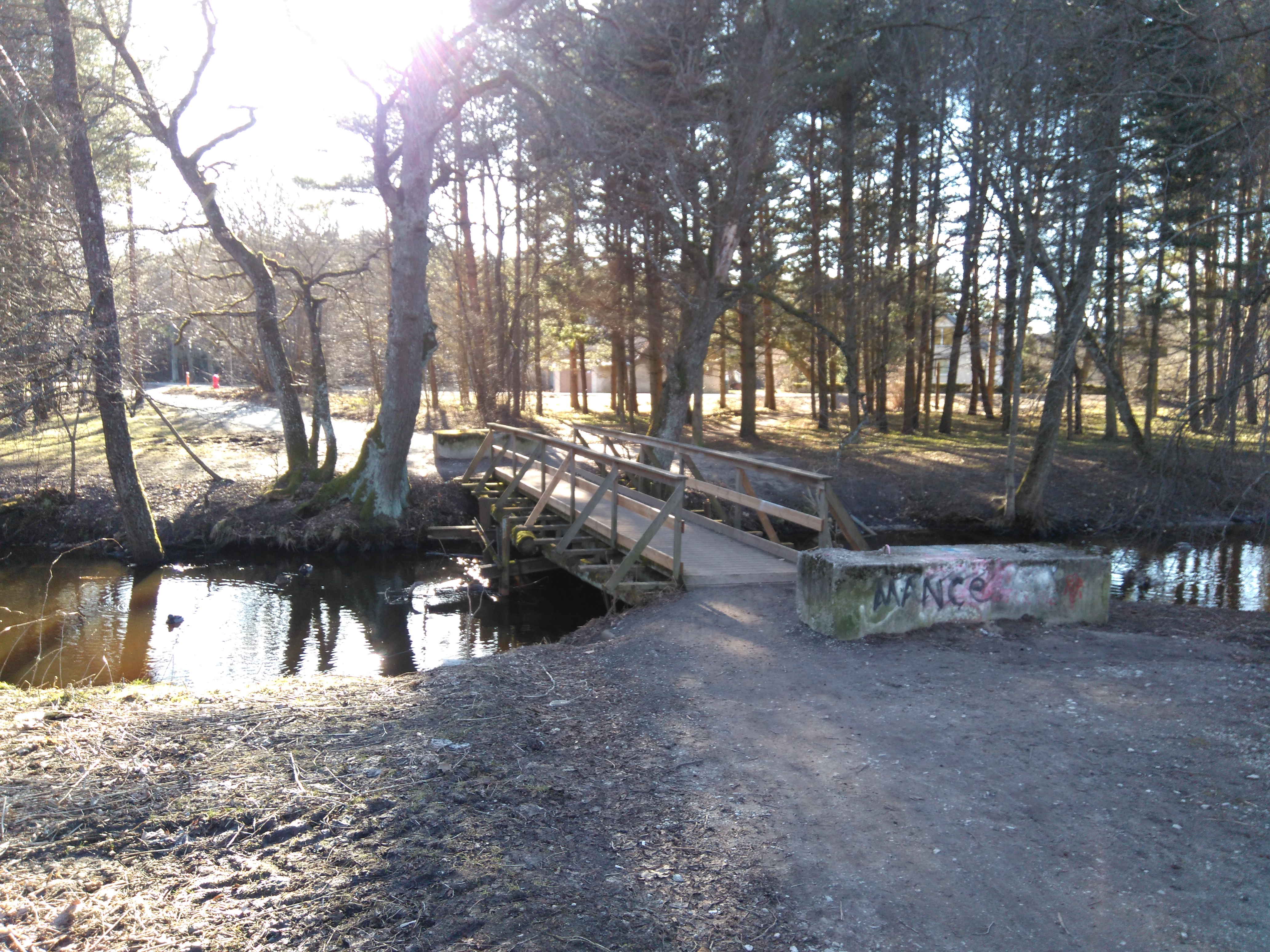 Tiskre tee